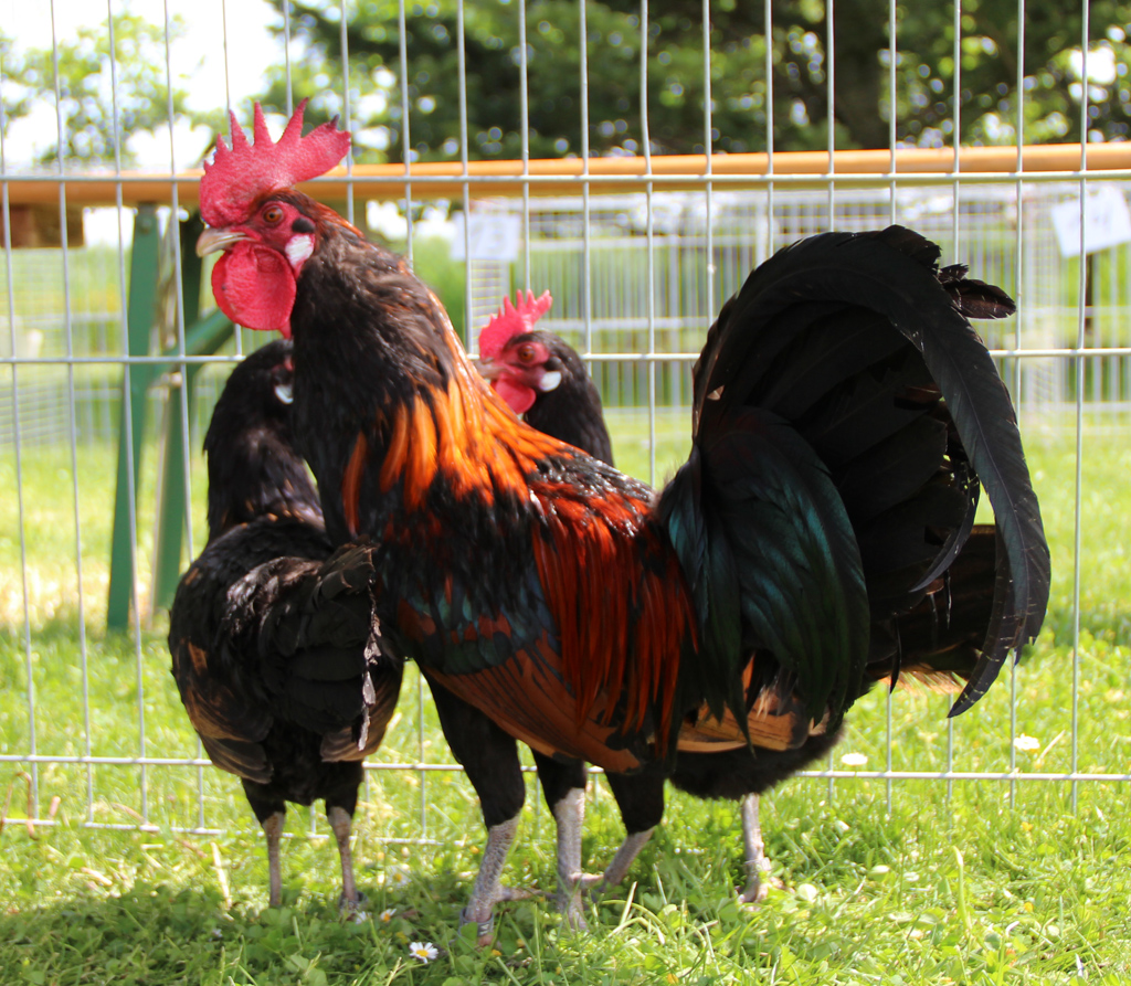 Ein Hahn und zwei Hennen der Zwergvariante des bergischen Krähers